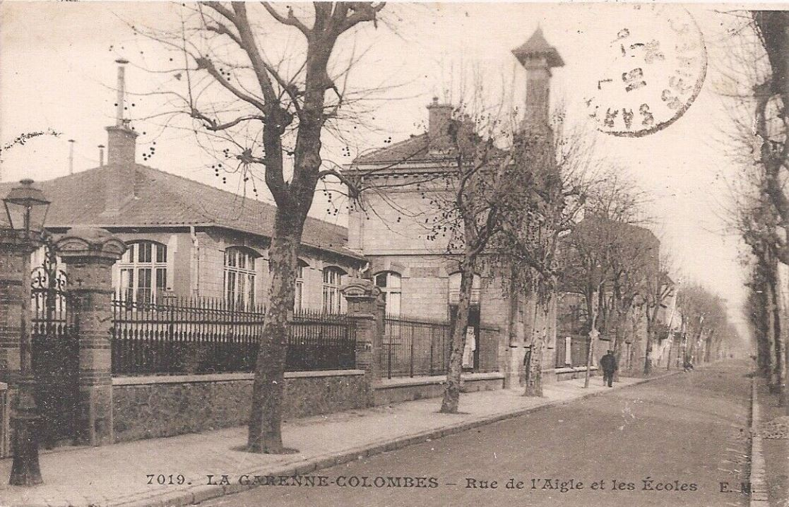 La Garenne-Colombes.Rue de l'Aigle.Écoles